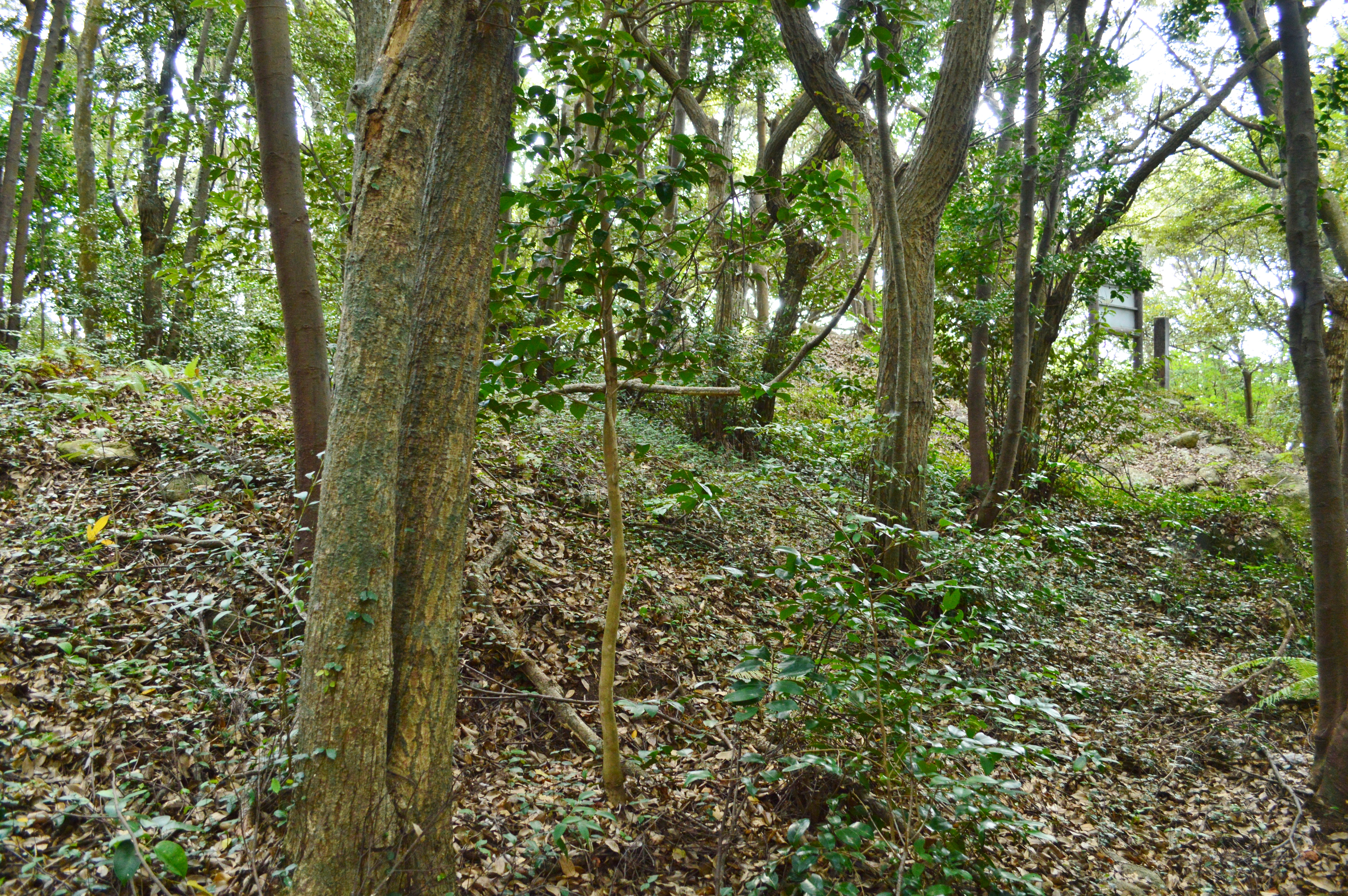 根曽第1号墳 墳丘全景